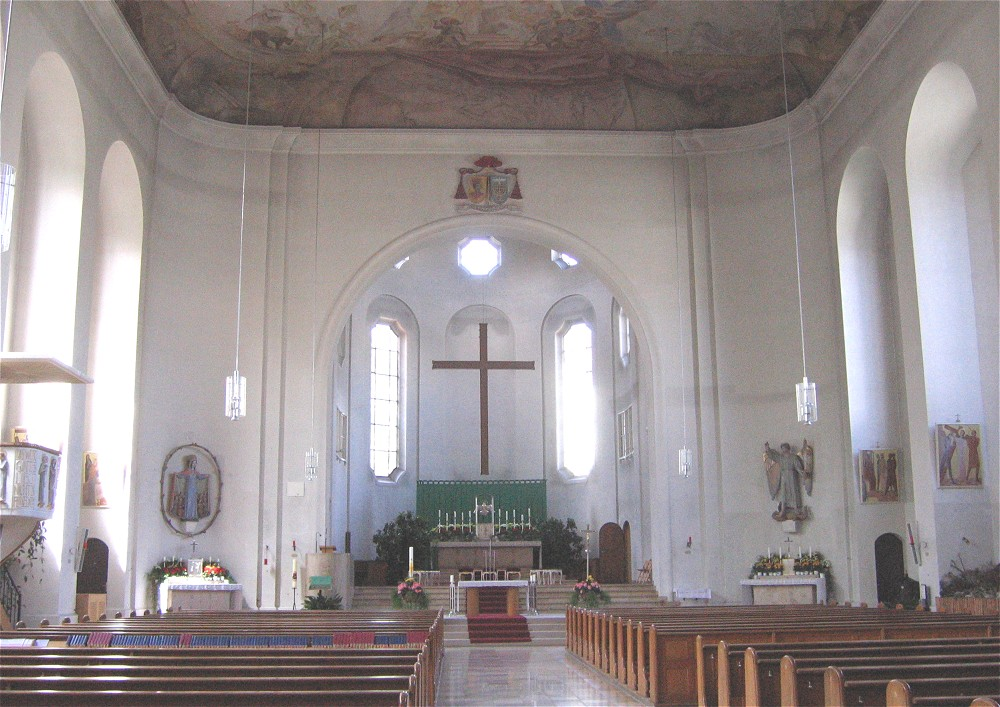 St._Korbinian, München